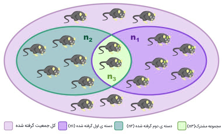 نمایش نمونه های گرفته شده در آزمایش شاخص لینکلن